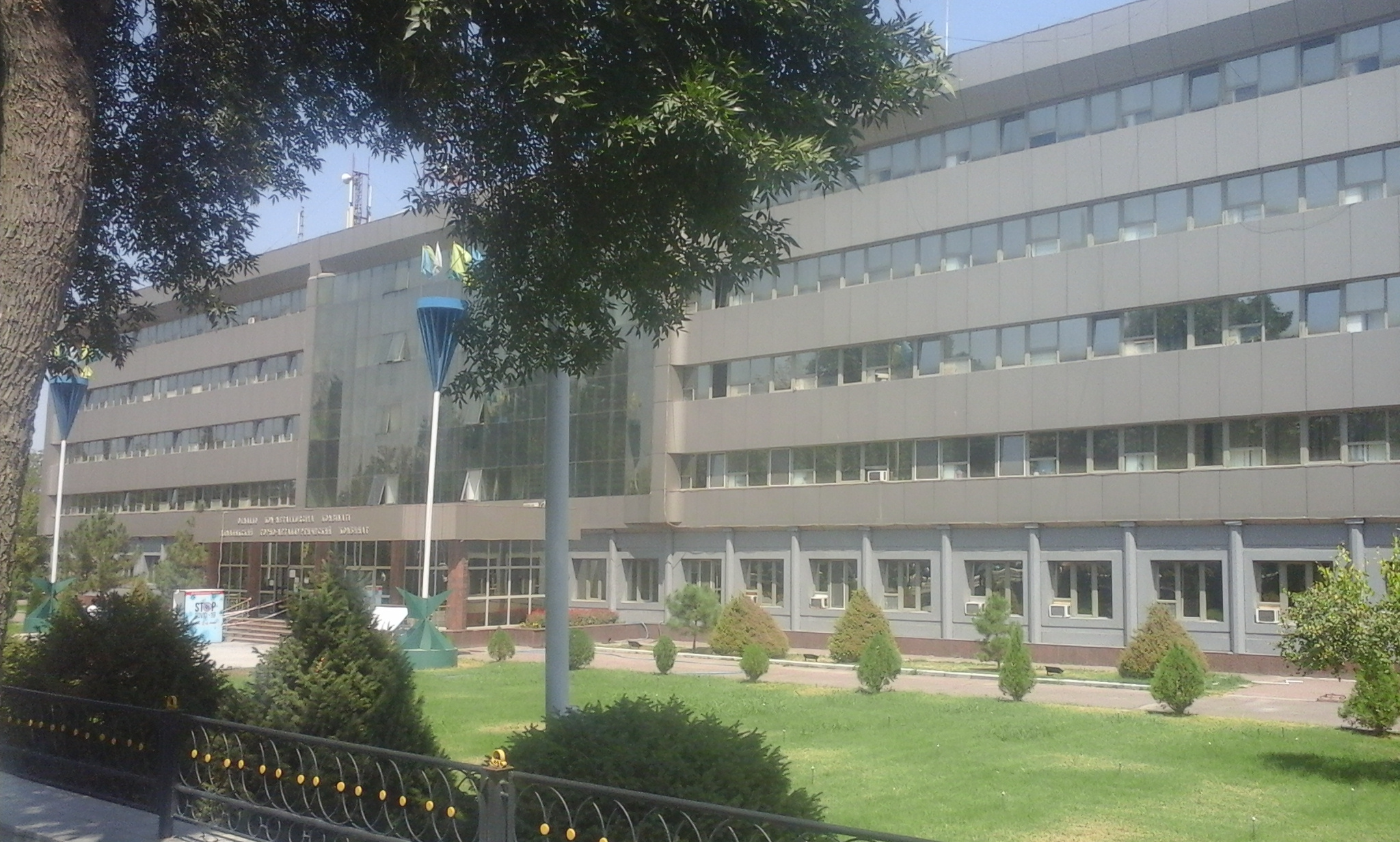 Алмалык. Фасад управления АГМК (ул Амира Тимура). 11 августа 2020 года